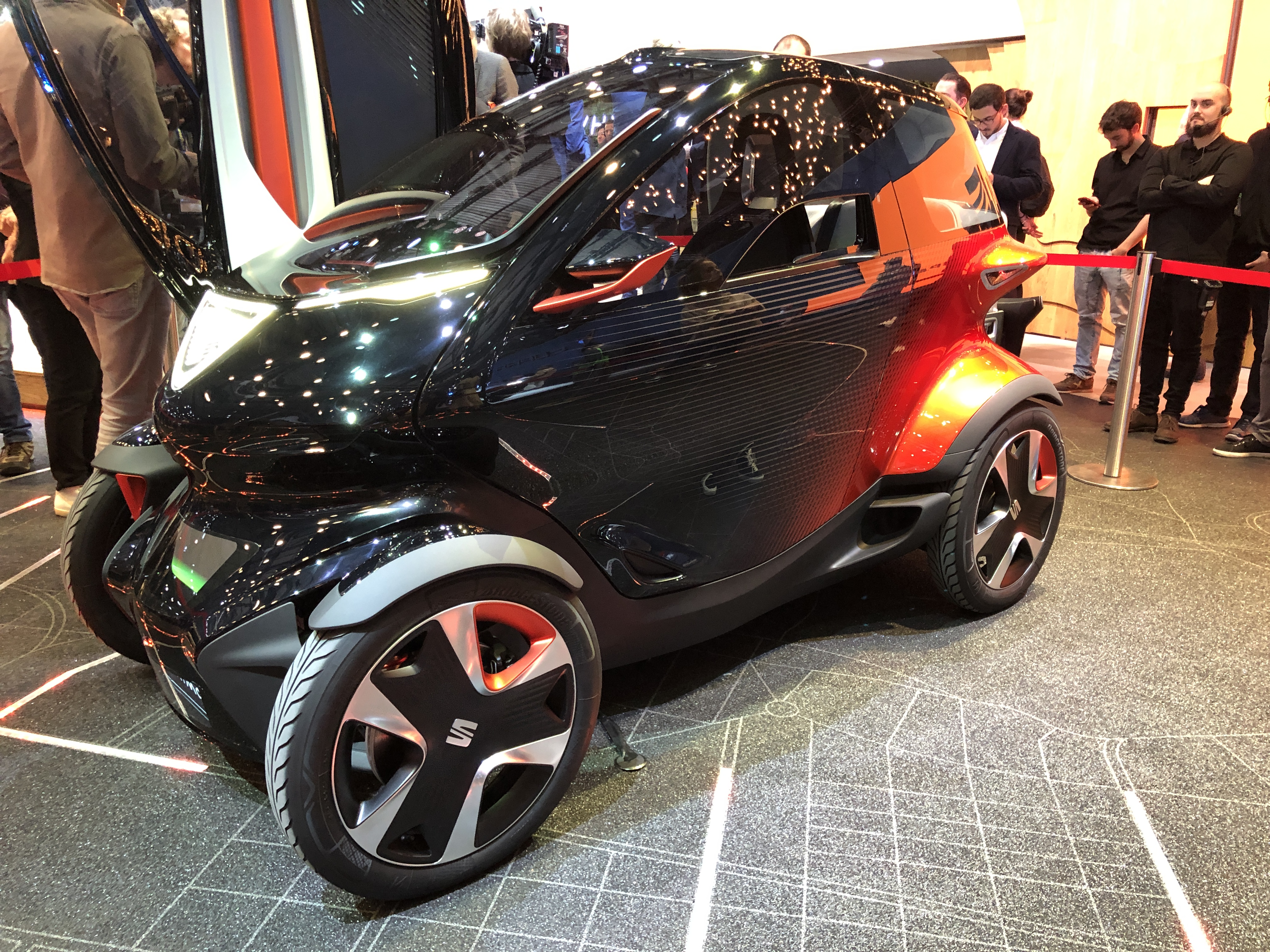 Vista delantera del SEAT Minimó, en el Salón del Automóvil de Ginebra 2019.